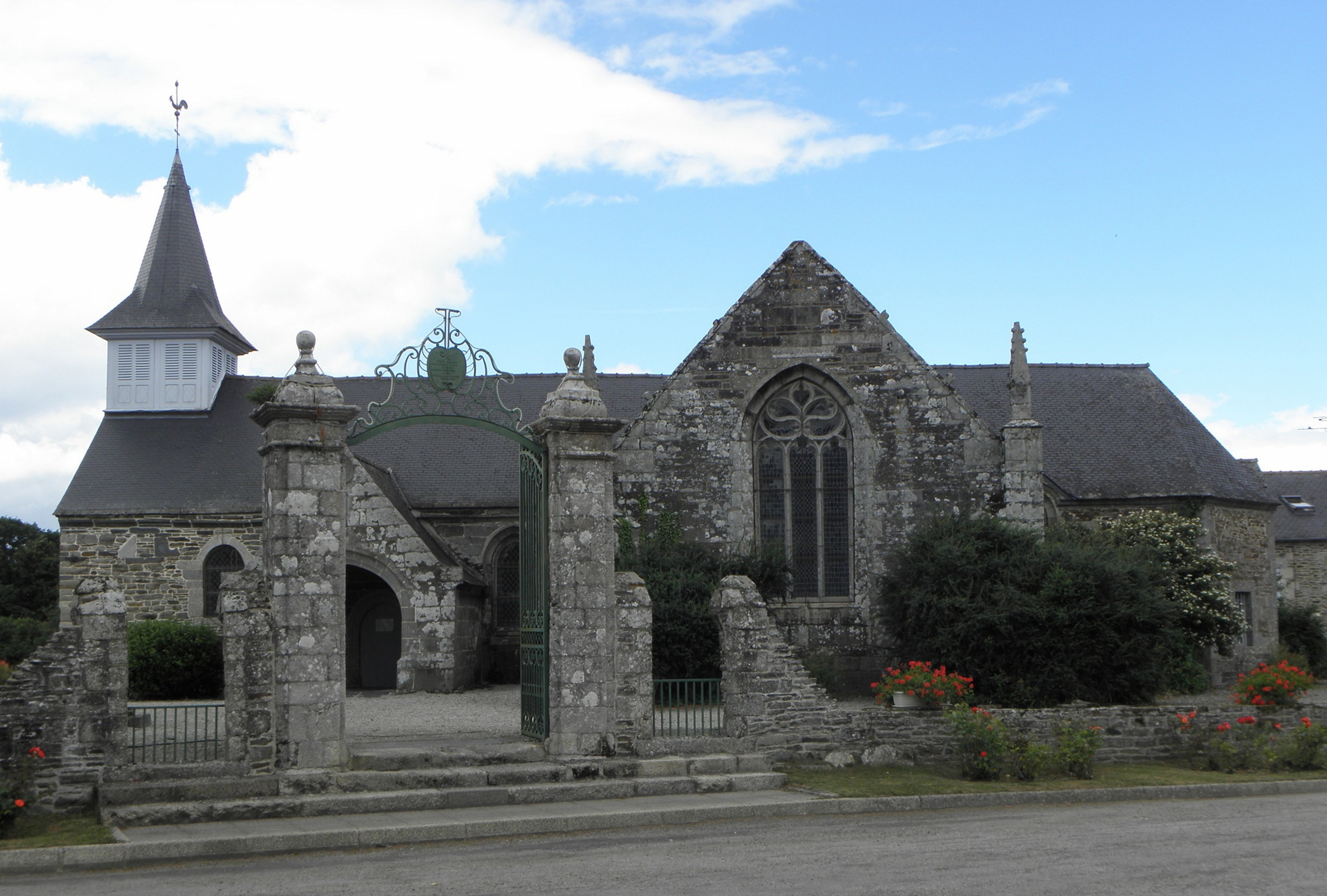 Église Sainte-Tréphine de Sainte-Tréphine (22). Vue méridionale.